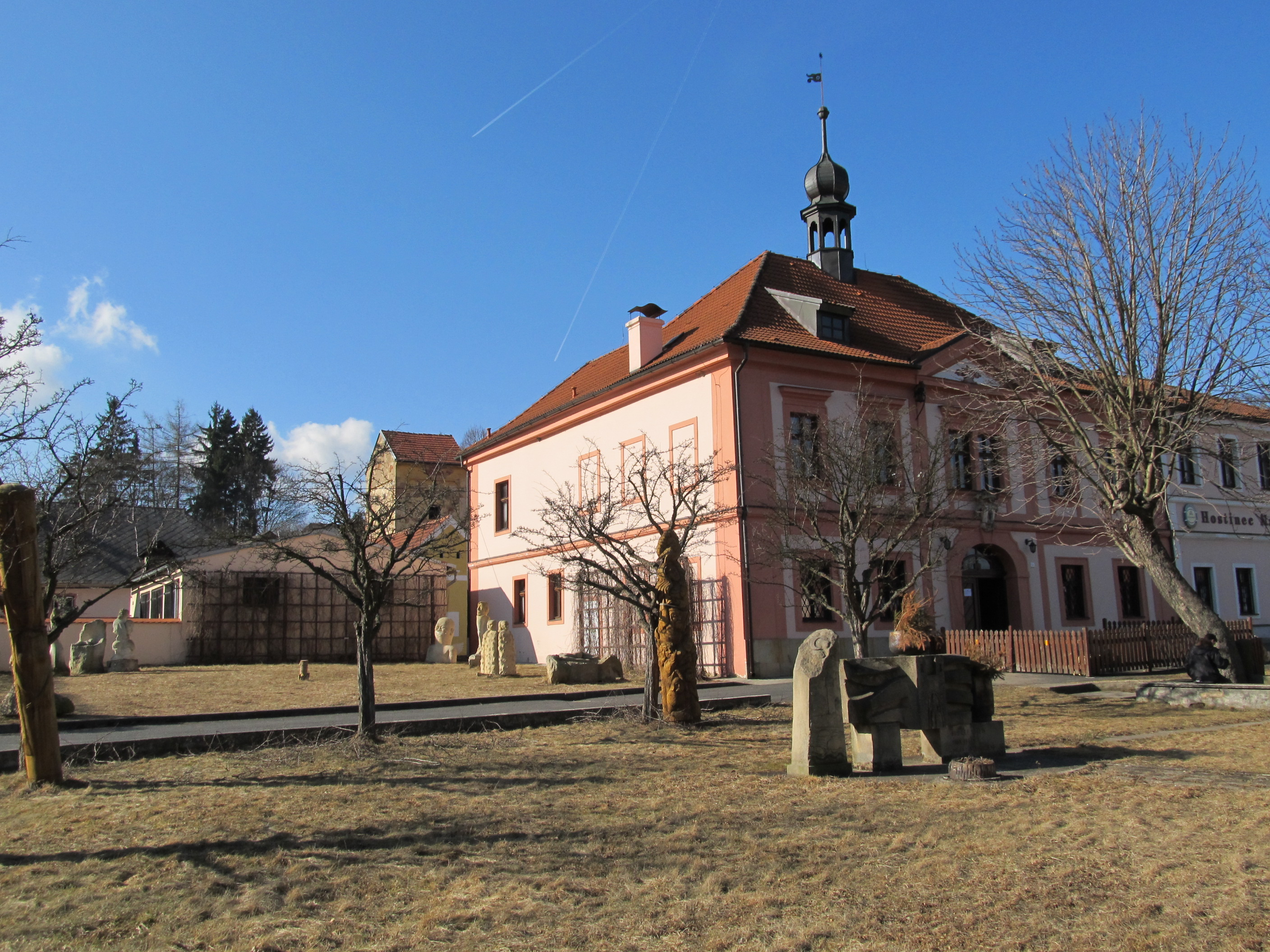 Nečtiny - radnice a soubor pískovcových soch